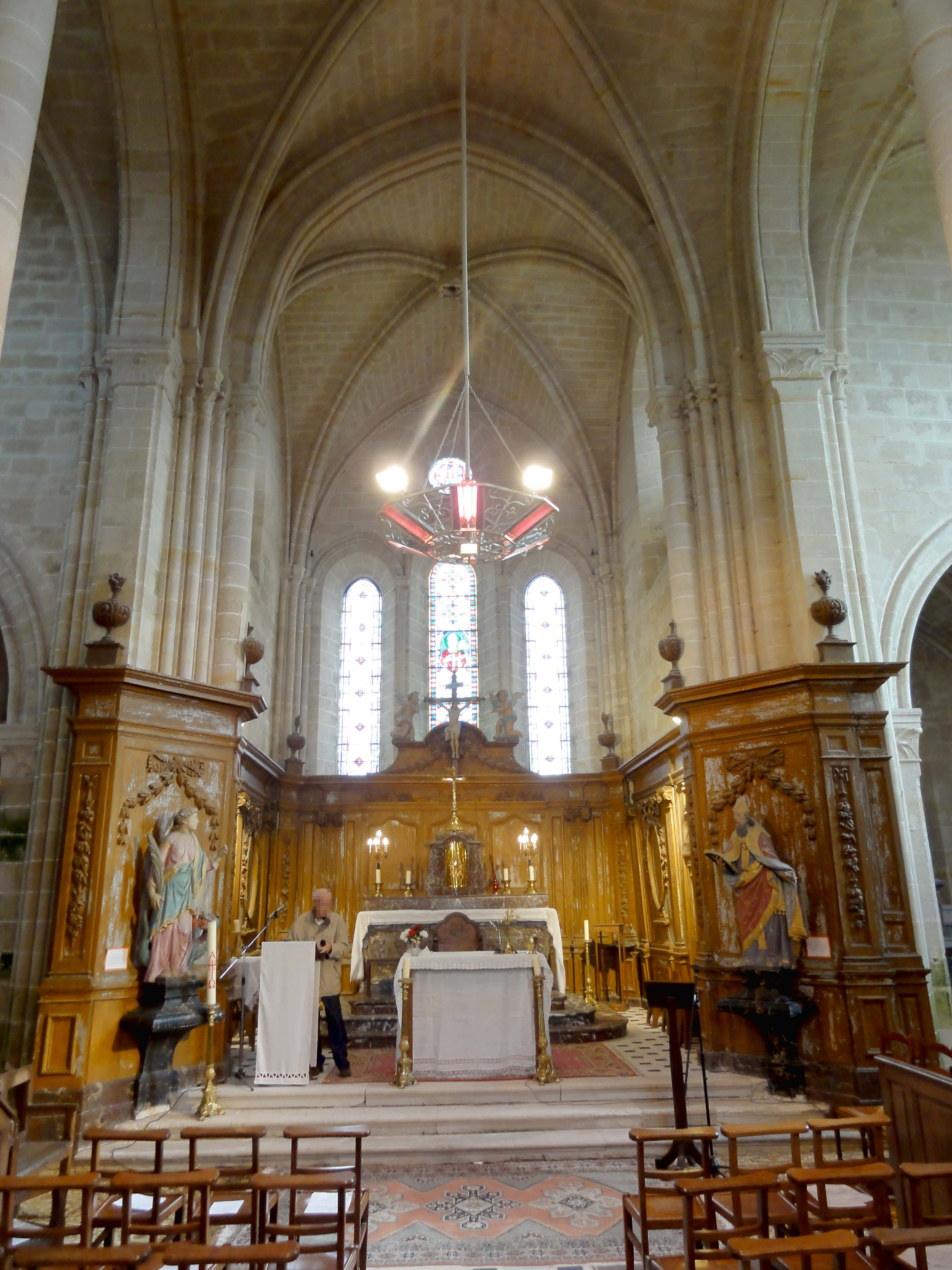 Intérieur de l'église - voir titre.